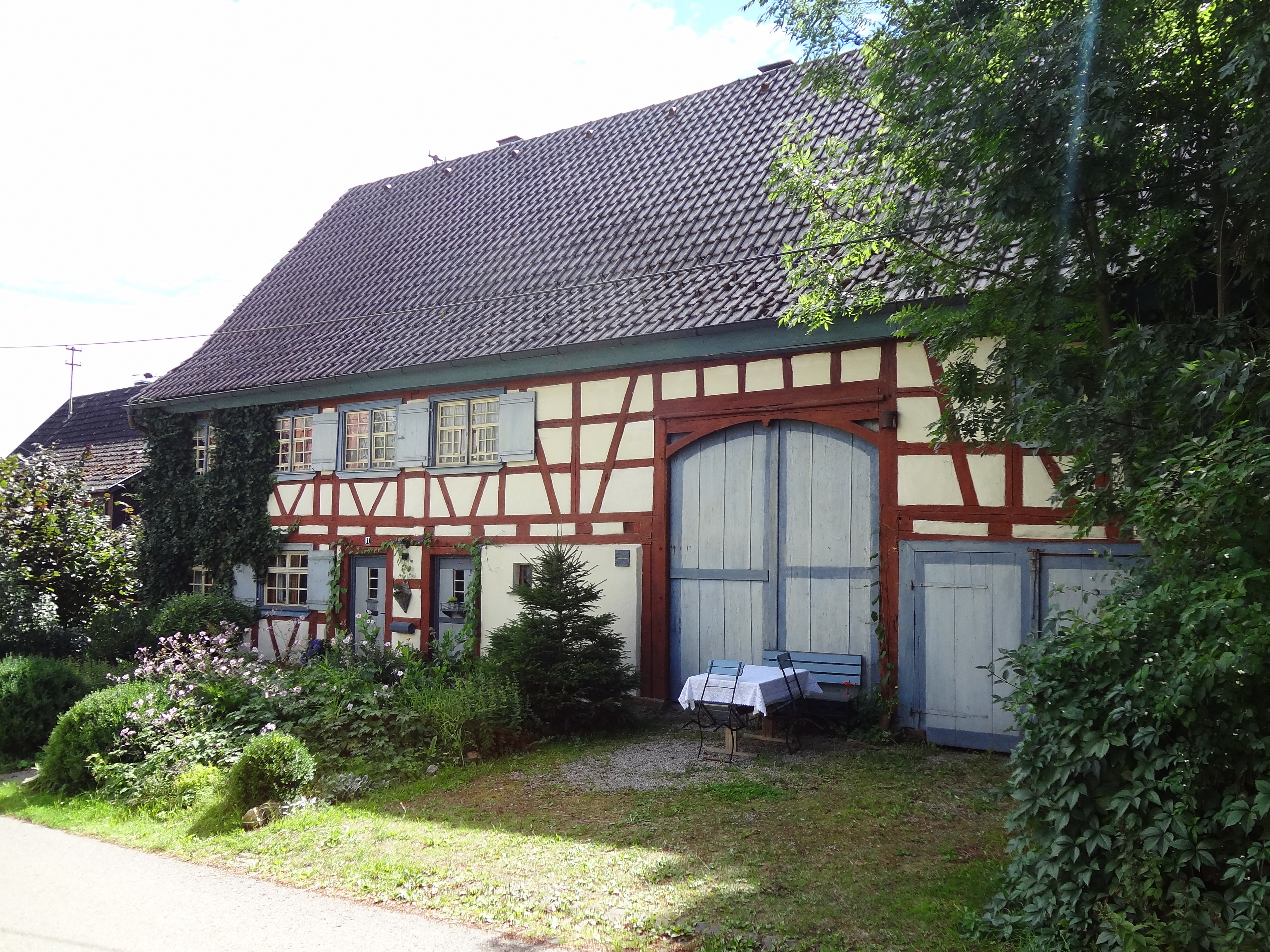 Sinkinger Weg 11, Zimmern-Flözlingen